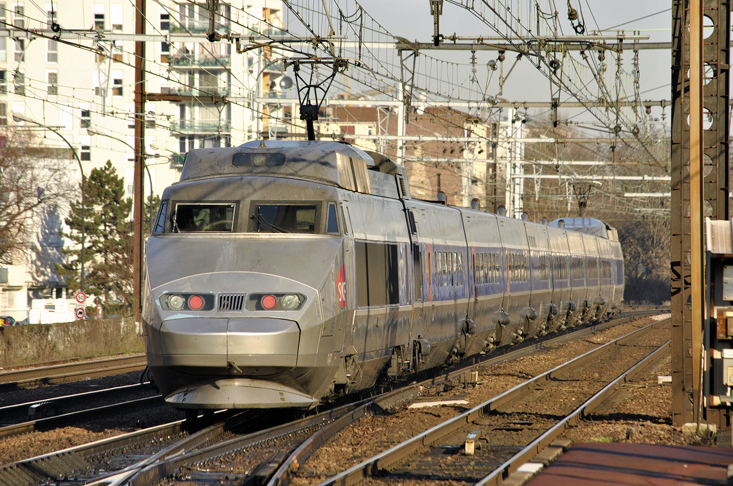 SNCF TGV PSE 35